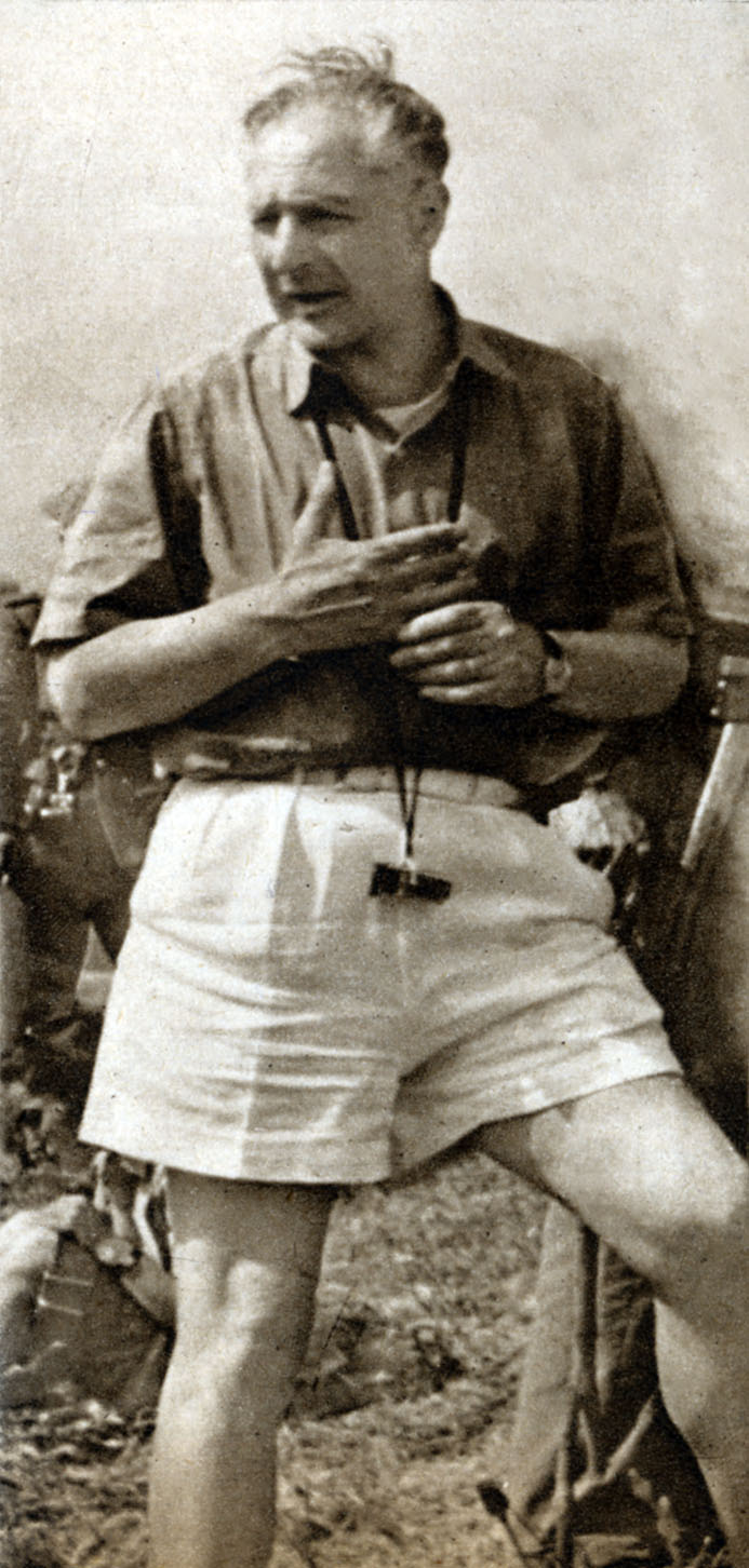 photo from magazine Almanacco Cinema 1952 (1951)